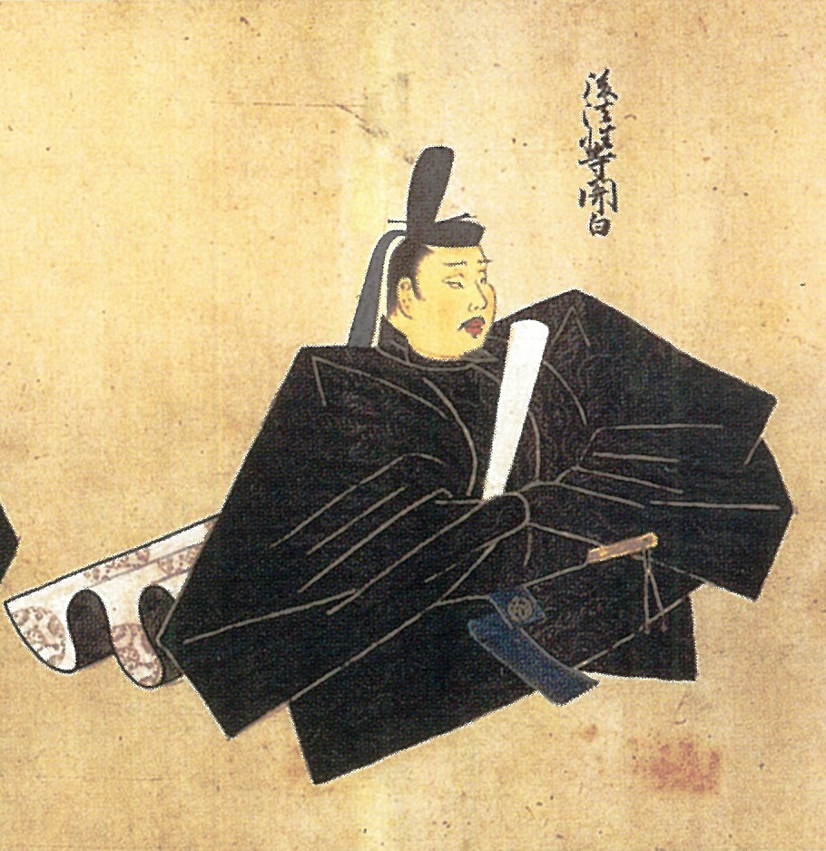 九条兼実像